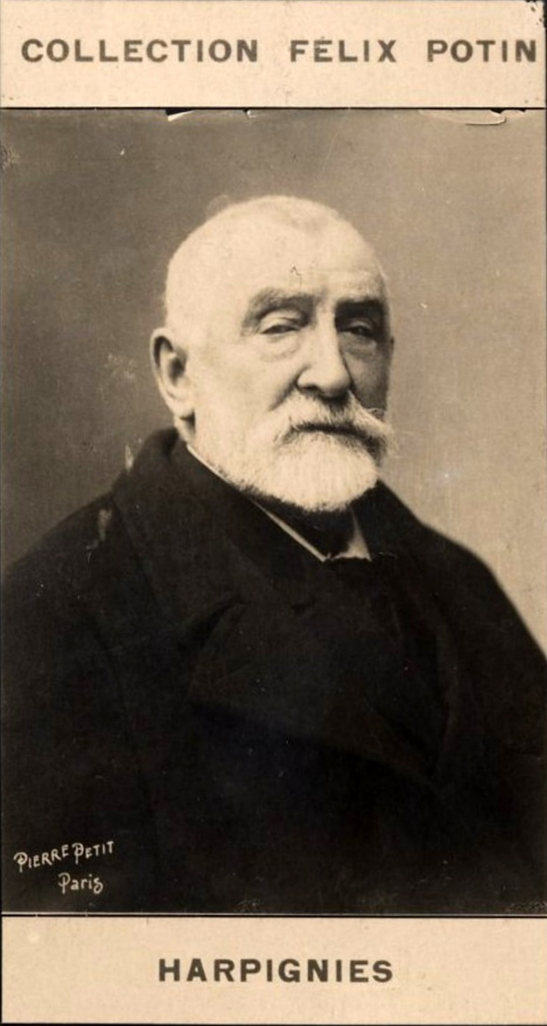 Harpignies